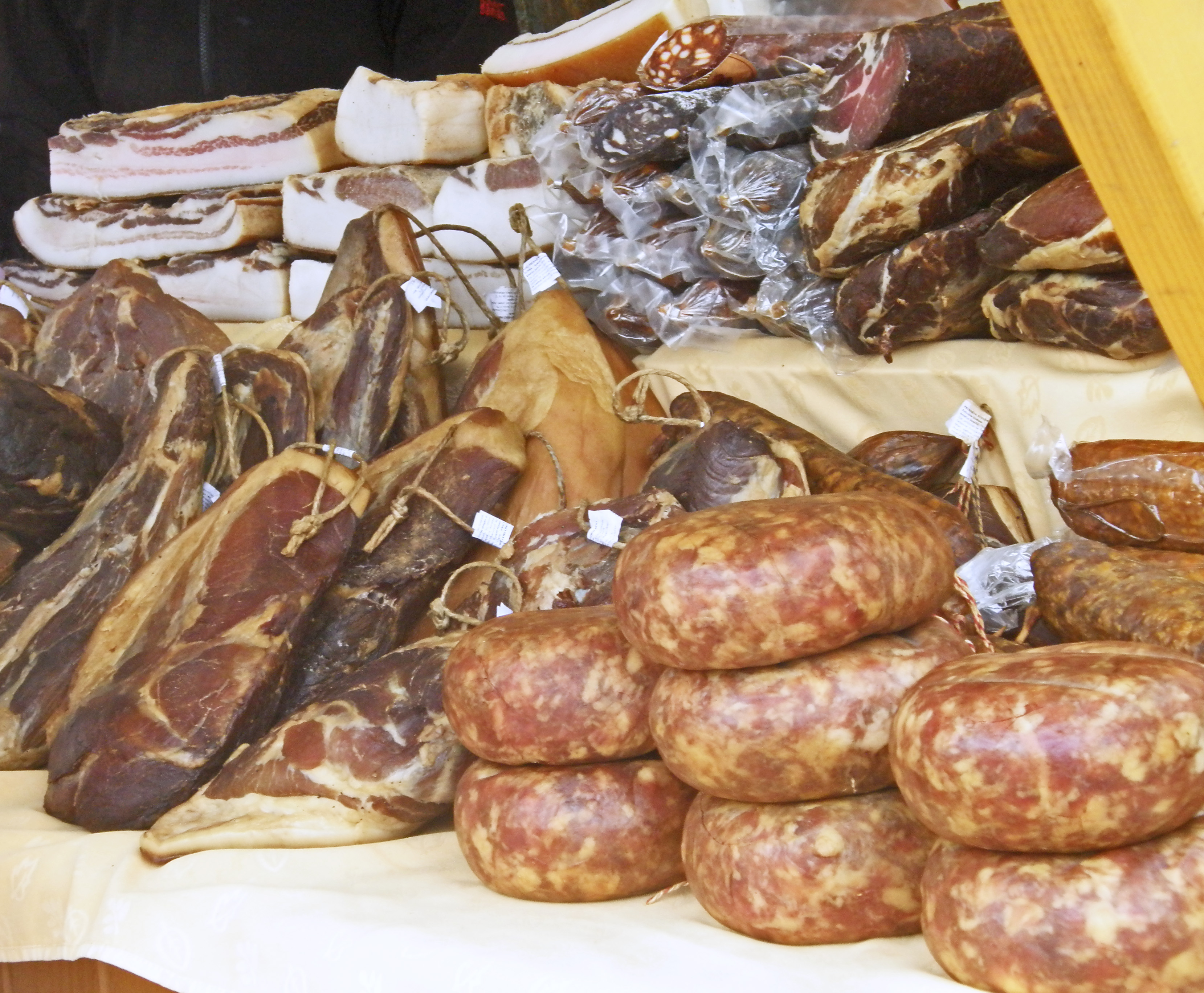 Free Morning in Ljubljana